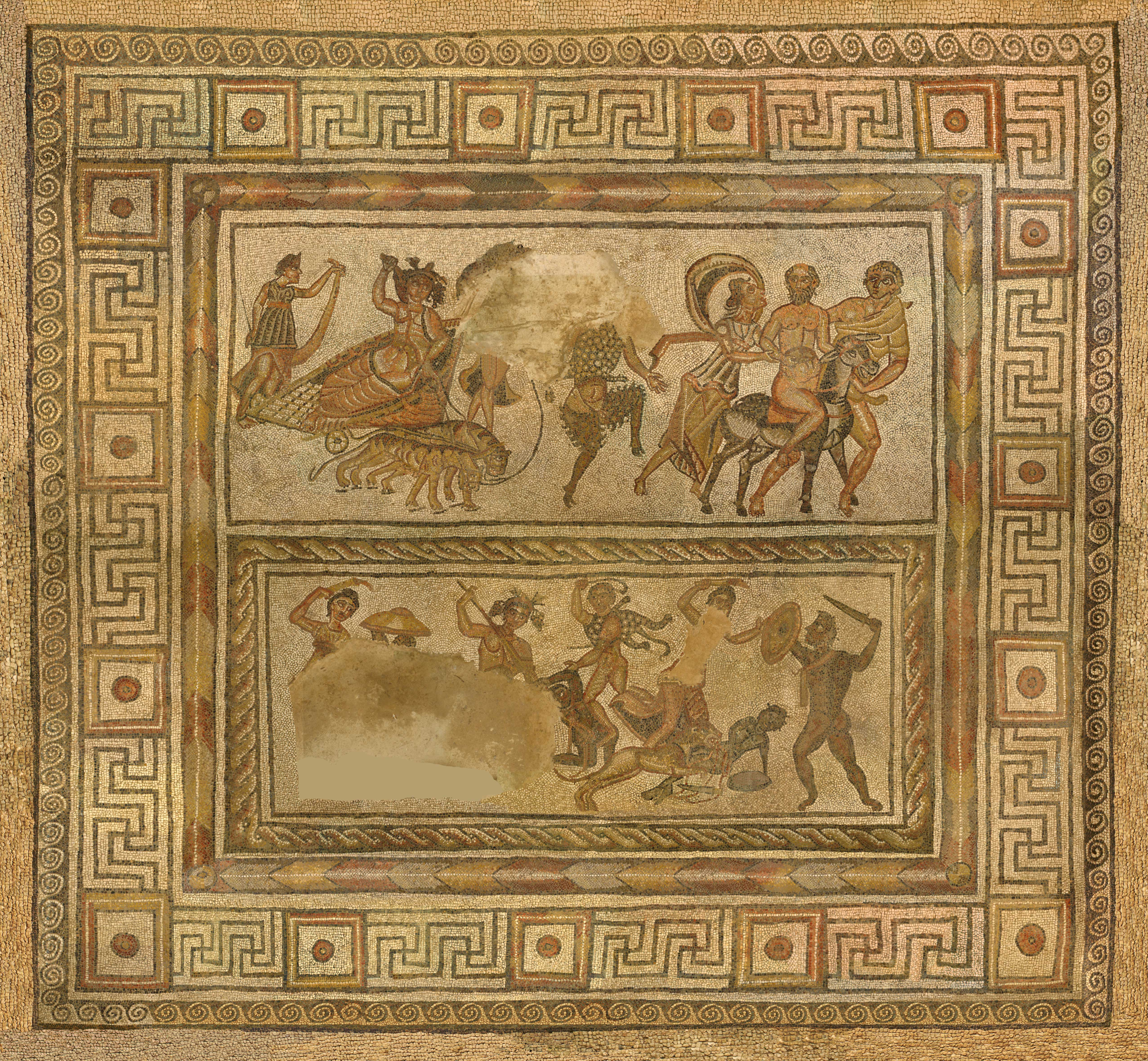 Este mosaico representa varias escenas de una temática conocida como El Triunfo de Baco.